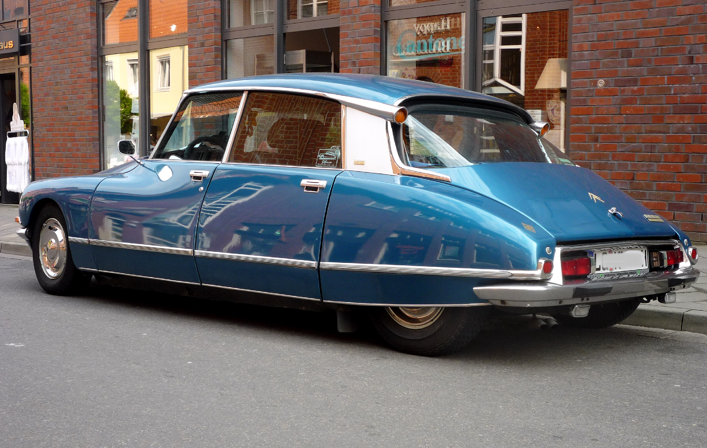 Eine Citroen DS Pallas in den Straßen von Lüneburg, DE. Mit "Pallas" wird die Luxusversion der Baureihe DS bezeichnet. Herstellungszeitraum 1955 - 1975.